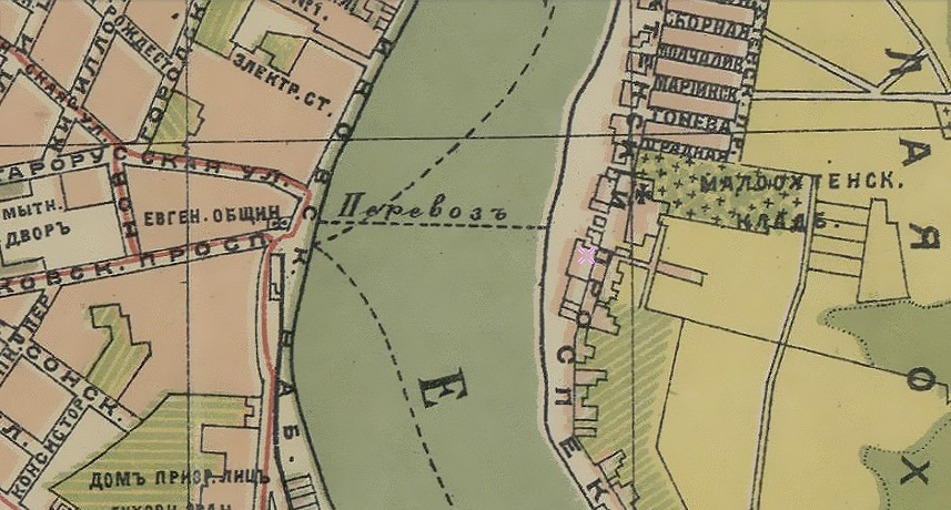 Малоохтенский перевоз через Большую Неву